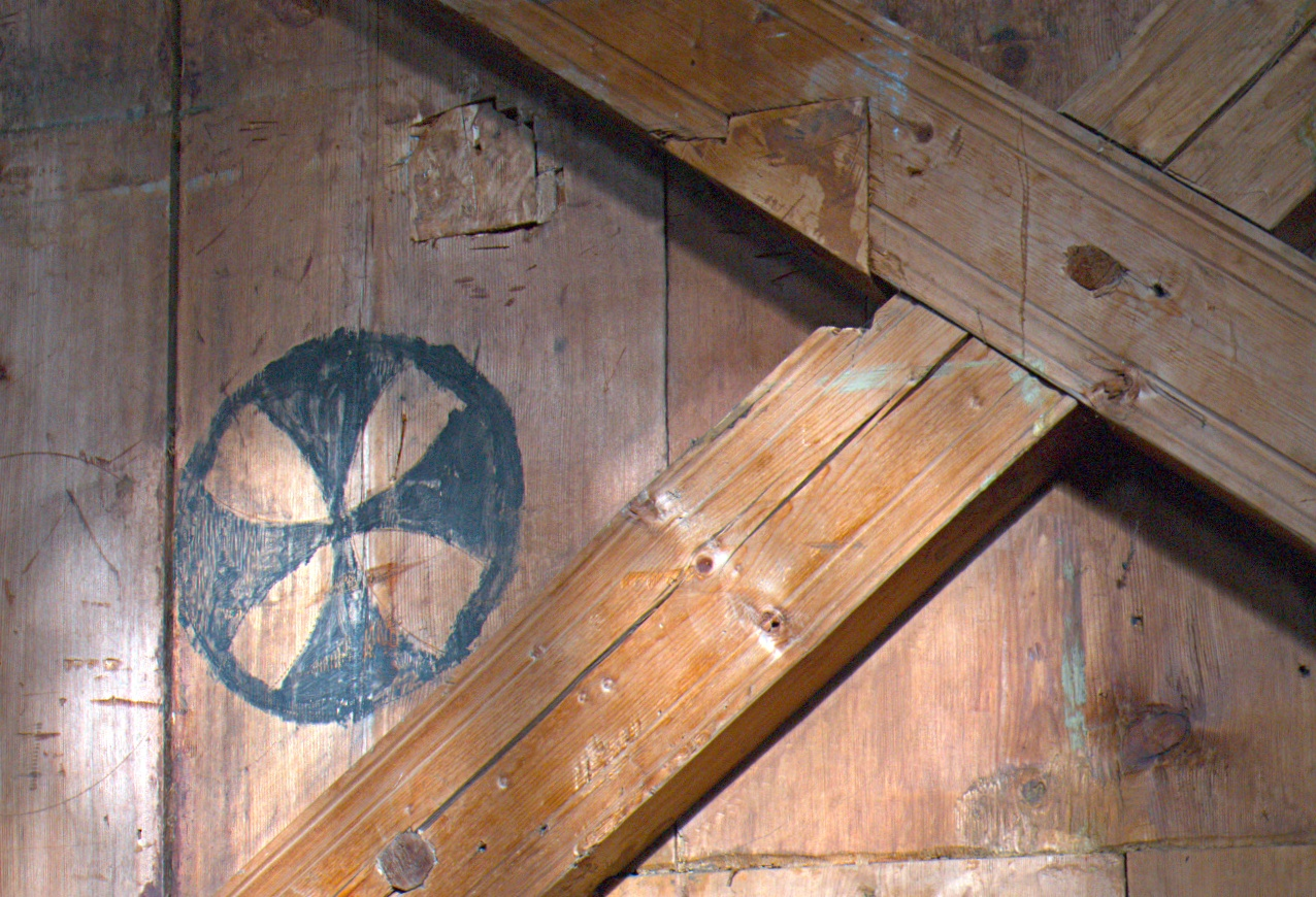 Ett av signingskorsene på nordveggen i Reinli stavkirke